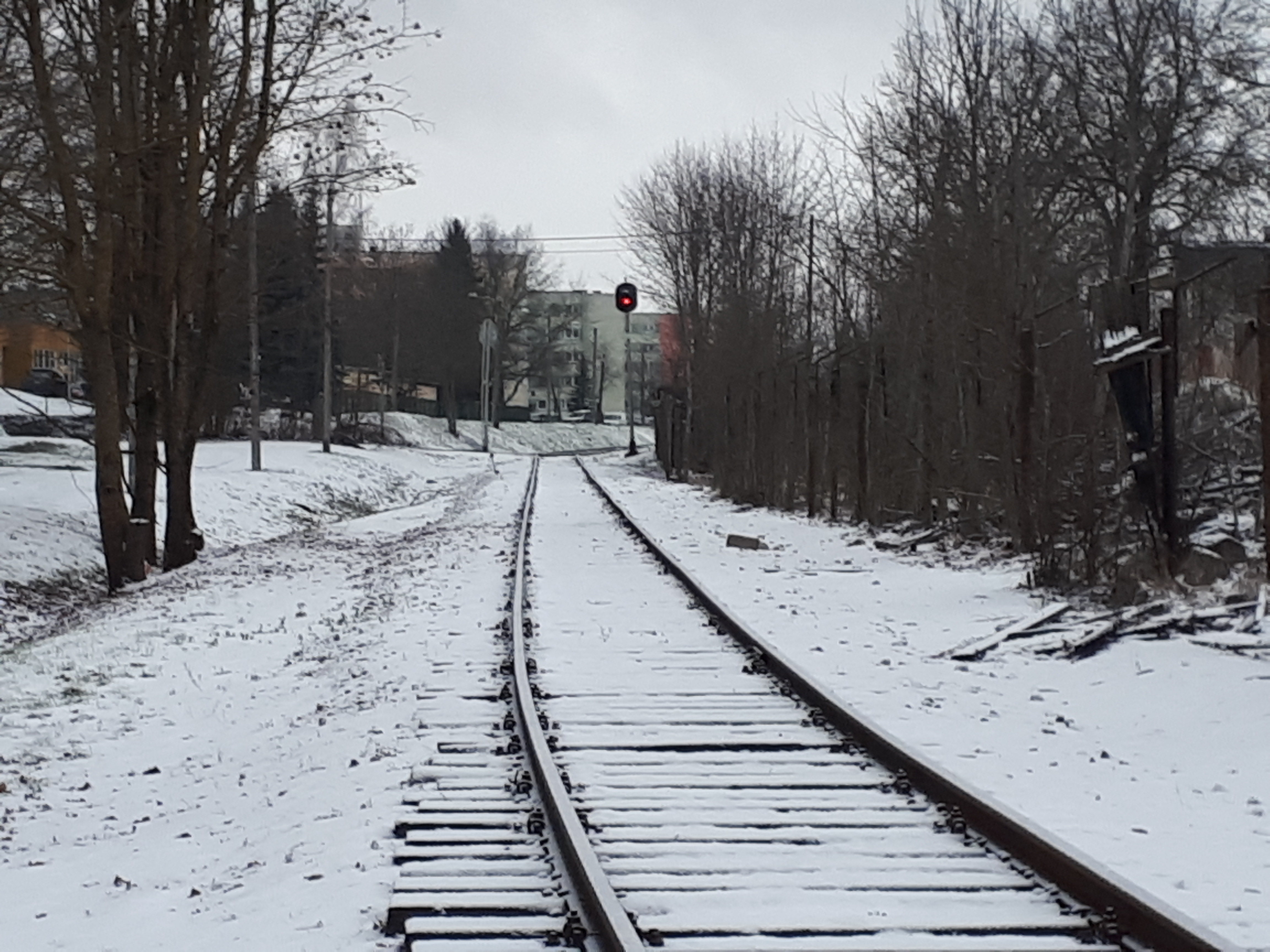 Tartu sadamaraudtee detsembris 2018.